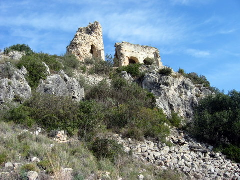 Castell de Castellví - Catalunya